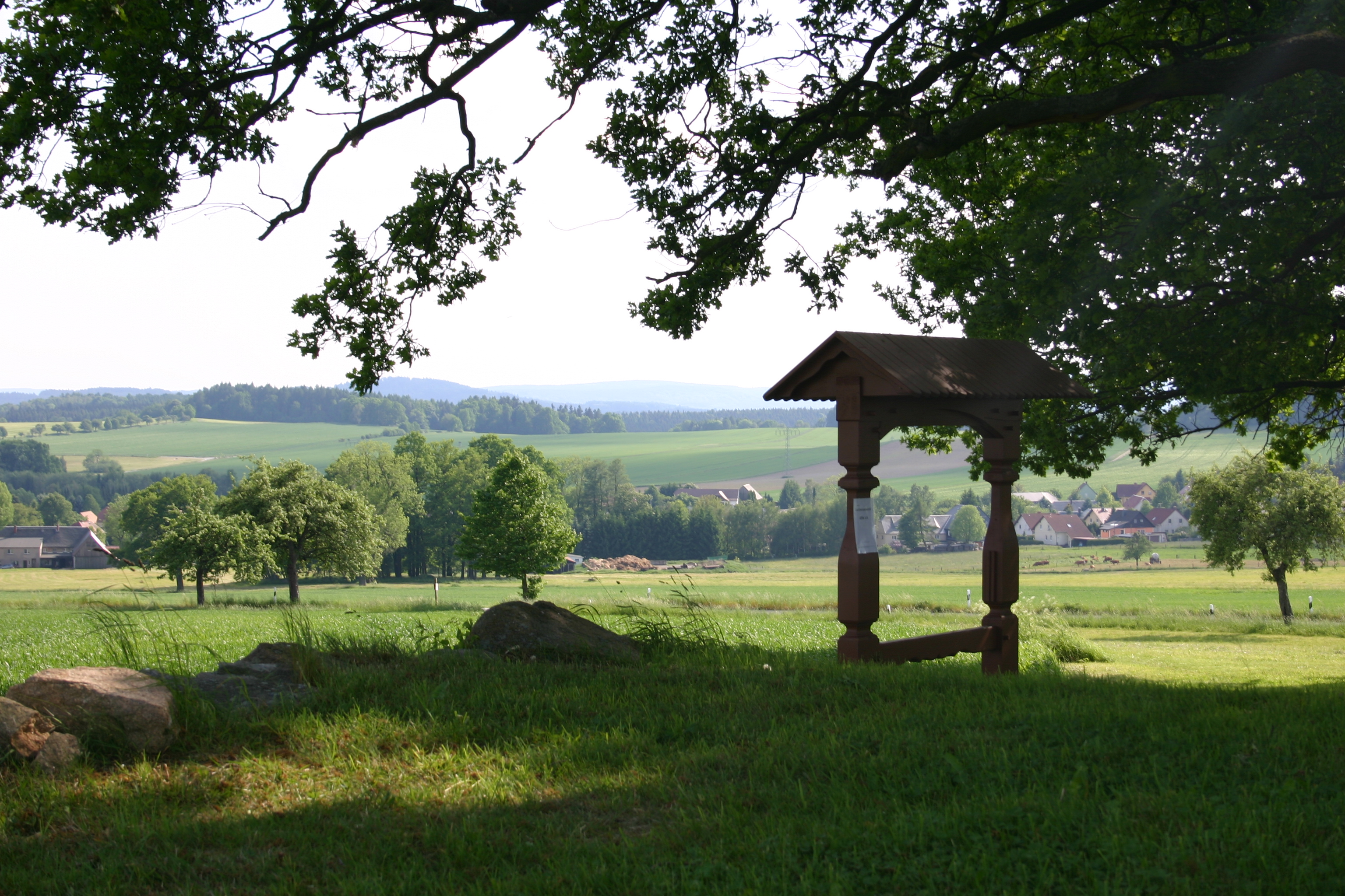 Blick vom Lochberg auf Schönbach. am 29.5.2017